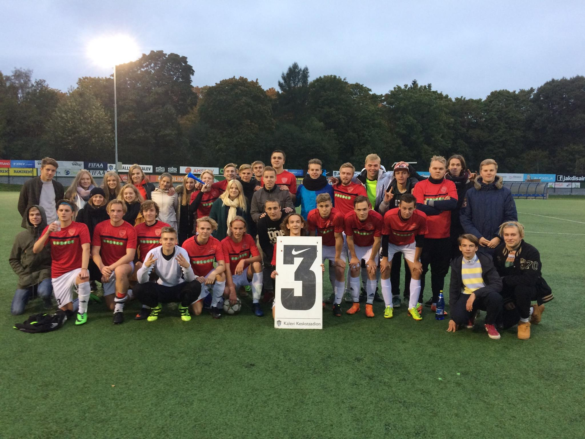 Tallinna FC Zapoos jalgpallimeeskond